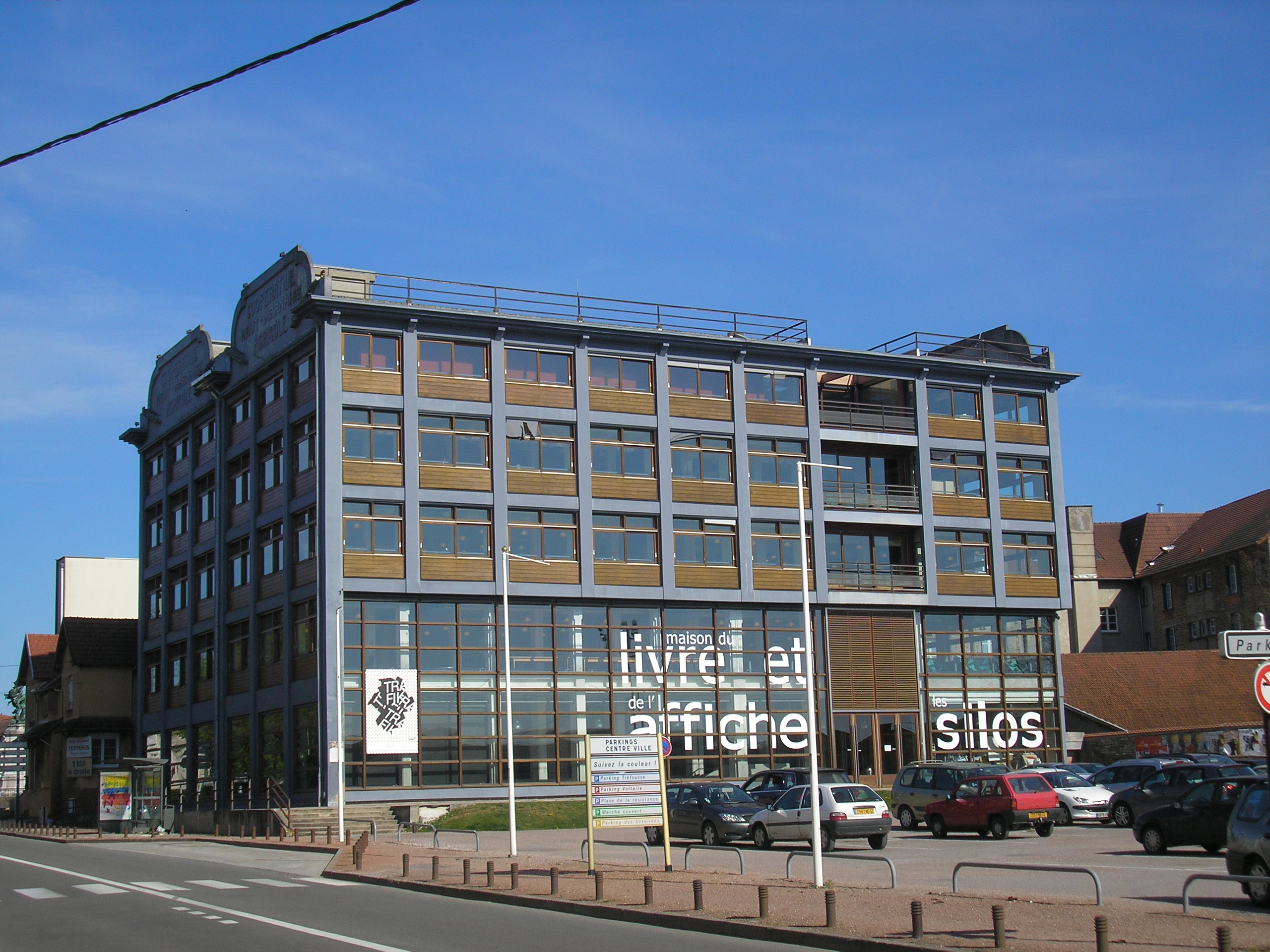 Les Silos, maison du livre et de l’affiche, 7-9 avenue Maréchal Foch, 52000 Chaumont (Haute-Marne), France. Bâtiment réaménagé dans l’ancienne Coopérative haut-marnaise agricole.